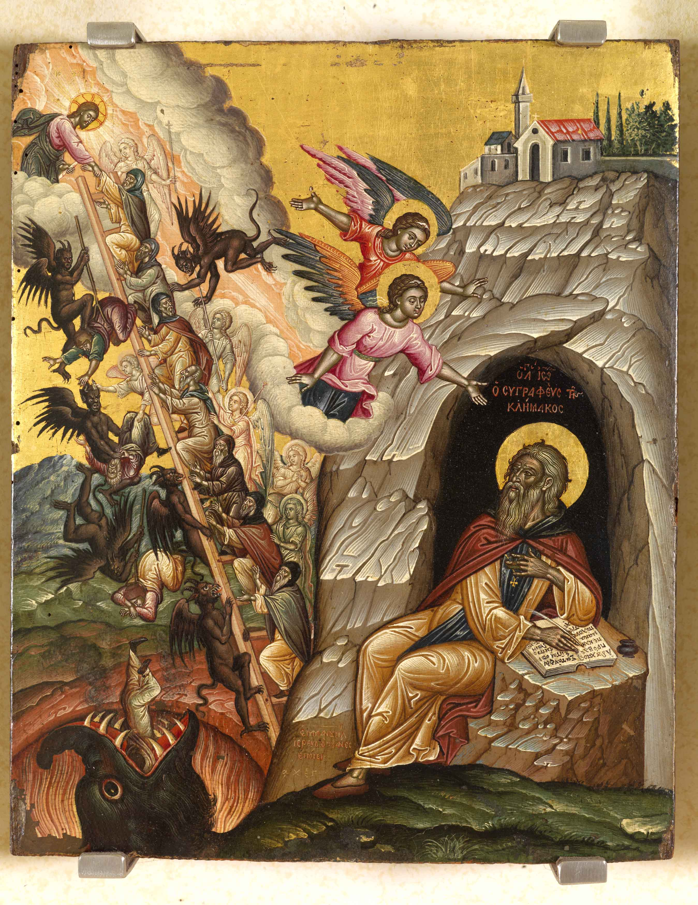 Ο Άγιος Ιωάννης της Κλίμακος 1663, 27x33εκ. Εμμανουήλ Τζάνε Μπουνιαλής "ΕΜΜΑΝΟΥΗΛ ΙΕΡΕΥC Ο ΤΖΑΝΕC ΕΠΟΙΕΙ ΑΧΞΓ΄" Στην εικόνα δεξιά παριστάνεται ο Ιωάννης της Κλίμακος μέσα σε σπήλαιο, την ώρα που συγγράφει το έργο του «Ουρανοδρόμος Κλίμαξ», από το οποίο πήρε και το όνομά του. Αριστερά, σύμφωνα με την παράδοση στην εικονογραφία του θέματος, βρίσκεται η κλίμακα που φτάνει μέχρι τον ουρανό, με τους μοναχούς που ανεβαίνουν τα σκαλοπάτια, βοηθούμενοι από αγγέλους, ή που κατακρημνίζονται από τους δαίμονες και καταλήγουν στο στόμα του βύθιου δράκοντα. Στον ουρανό ο Χριστός μέσα σε σύννεφα, υποδέχεται τον πρώτο μοναχό που κατάφερε να φτάσει στο πιο ψηλό σκαλί. Στο βράχο, επάνω από τη σπηλιά, βρίσκεται μοναστήρι, ίσως η Μονή του Σινά, όπου και μόνασε ο Ιωάννης.